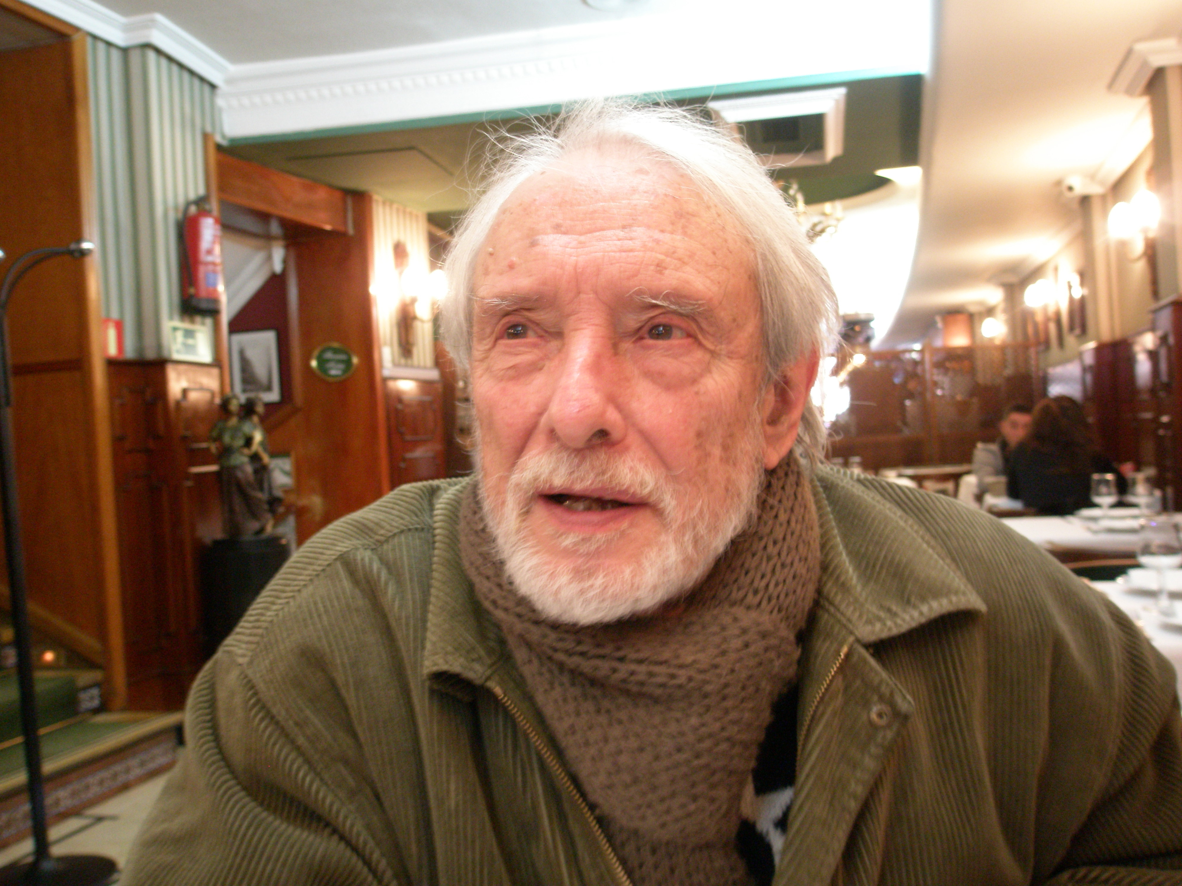 Imagen de Rafael Llopis Paret